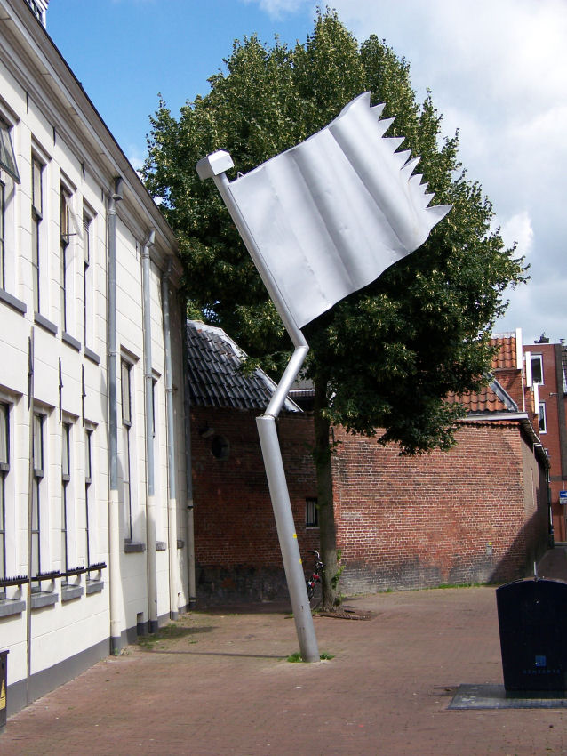 "5 mei-vlag" door Henri de Wolf, Groningen (NL)